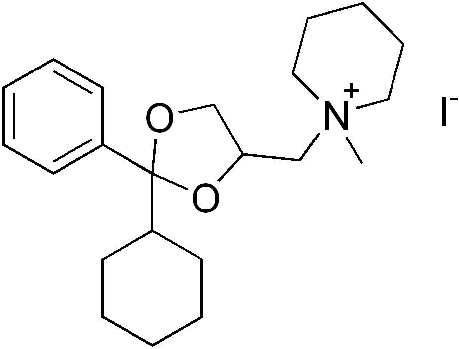 chemical structure of oxapium iodide (cyclonium, ciclonium)